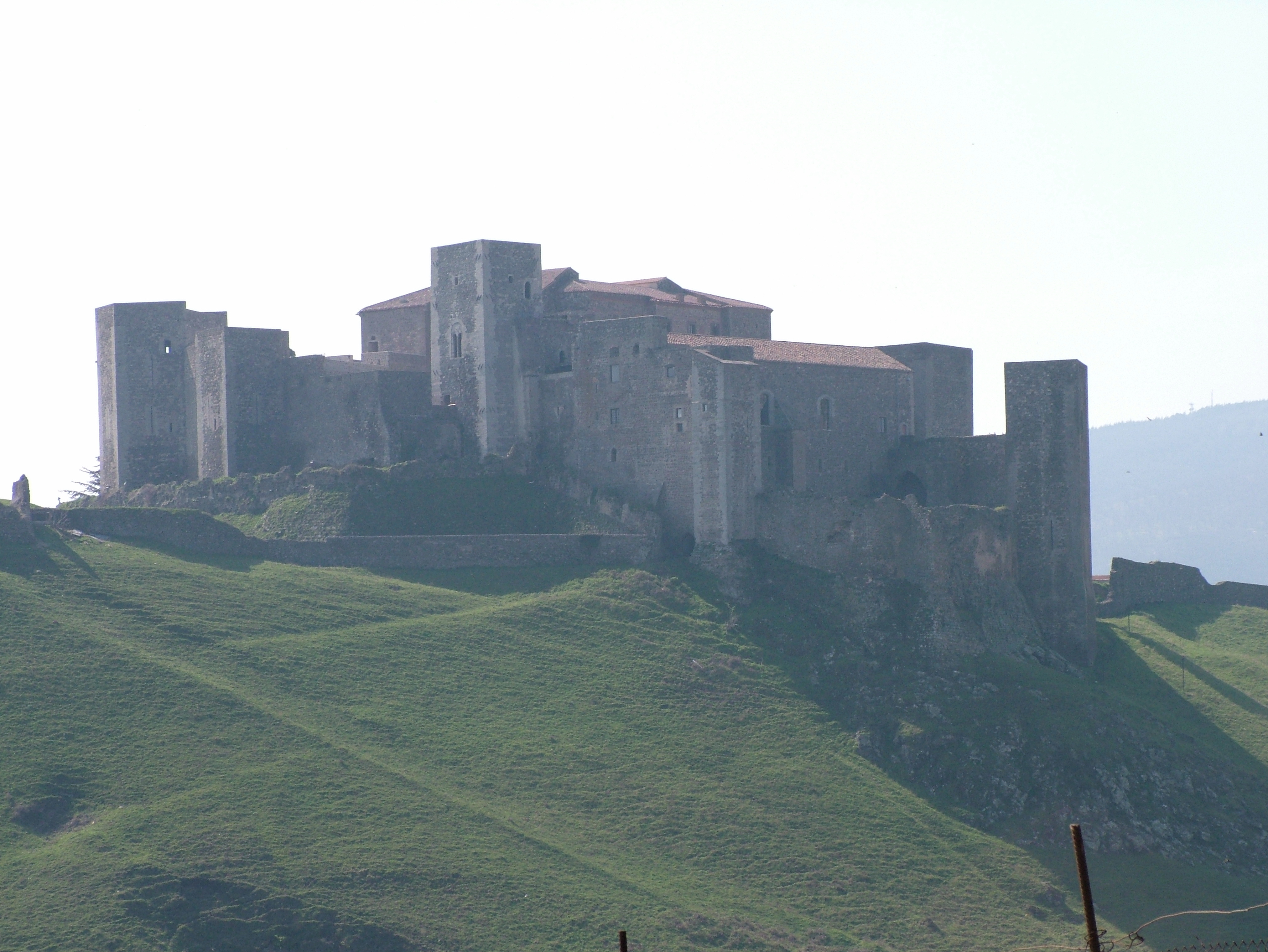 Castello federiciano This is a photo of a monument which is part of cultural heritage of Italy.